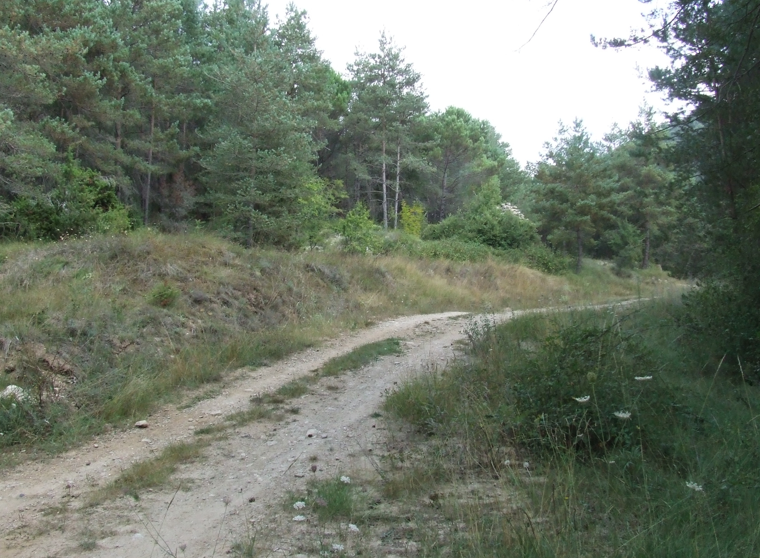 La Tuna (Castellcir, Moianès)